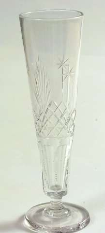 Polhøydeglass kalte man denne typen pjolterglass som på Hadeland Glassverk kom i produksjon i 1880-årene. Slike glass tok man polhøyden med.[1] Høyde 24,5 cm. Norsk Folkemuseum. NF.1968-0233. Foto: Anne-lise Reinsfelt.